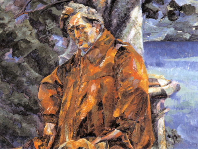 detail